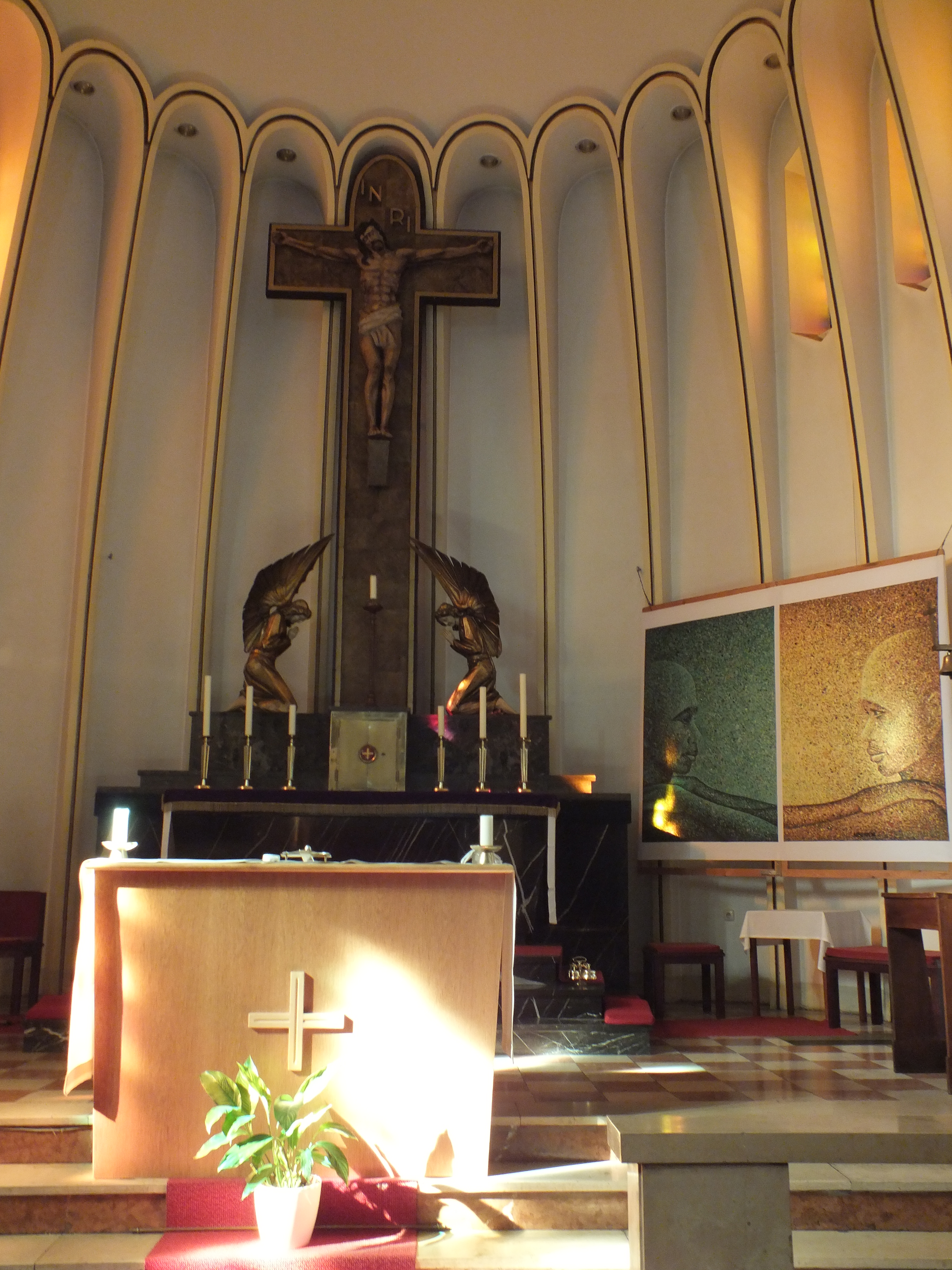 Kirche Maria Magdalena, Berlin-Niederschönhausen: Chor mit Altar